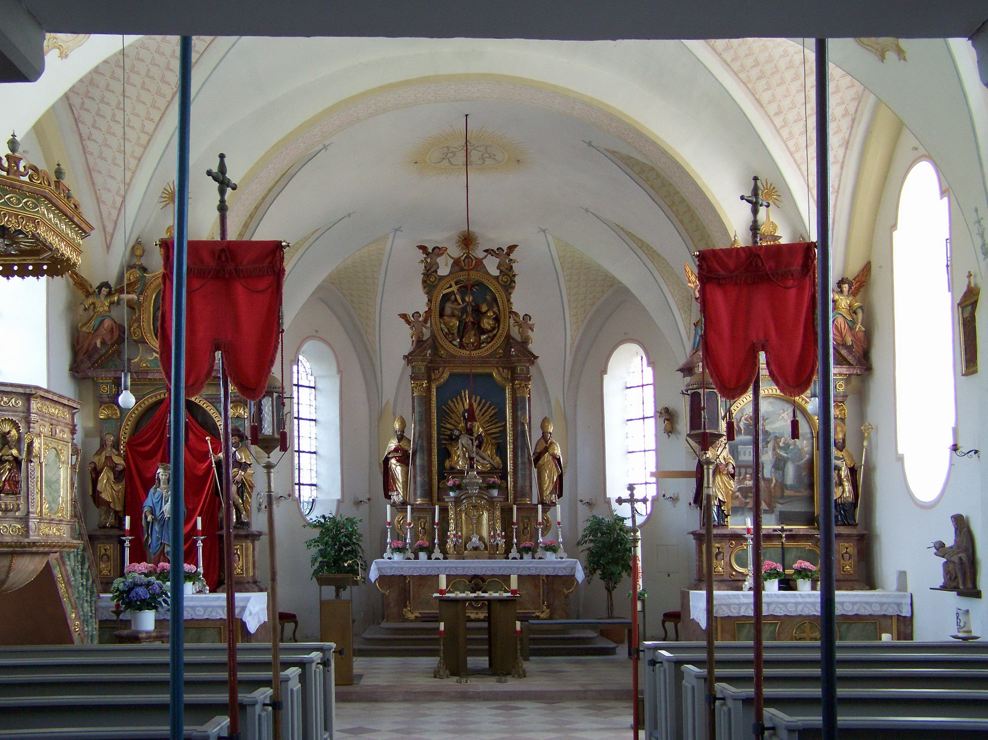 Linden, Kindergartenweg 7. Katholische Filialkirche Sankt Maria und Maternus, genannt Maria zu den Sieben Schmerzen. Barocker Saalbau mit westlichem unverputztem Satteldachturm, ehemals Chorturm um 1400. Saalbau von Melchior Höck 1629/30; mit Ausstattung. Innenraum.